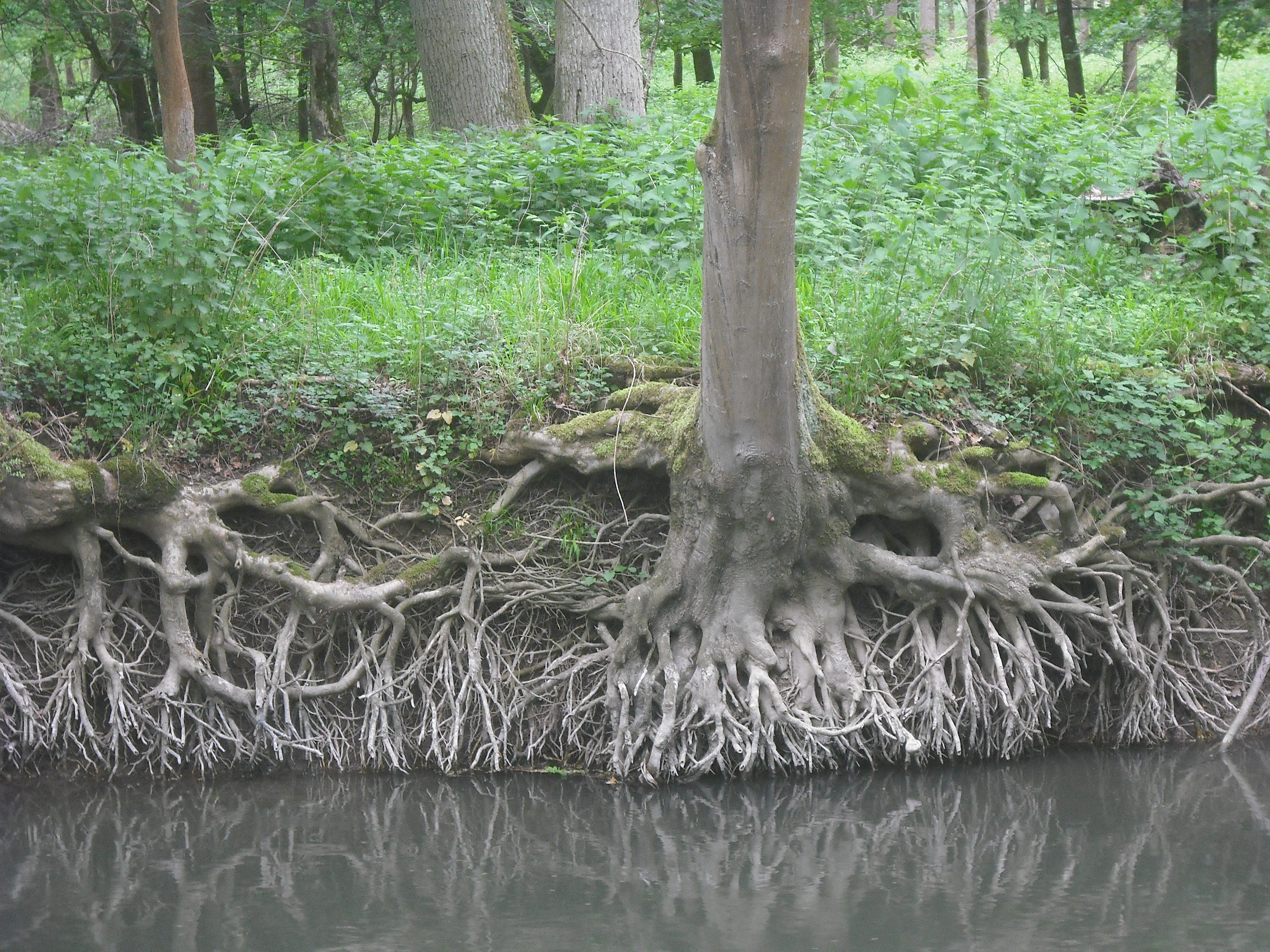 Oberriedgraben, réserve de l'Illwald, Sélestat, Bas-Rhin, France.